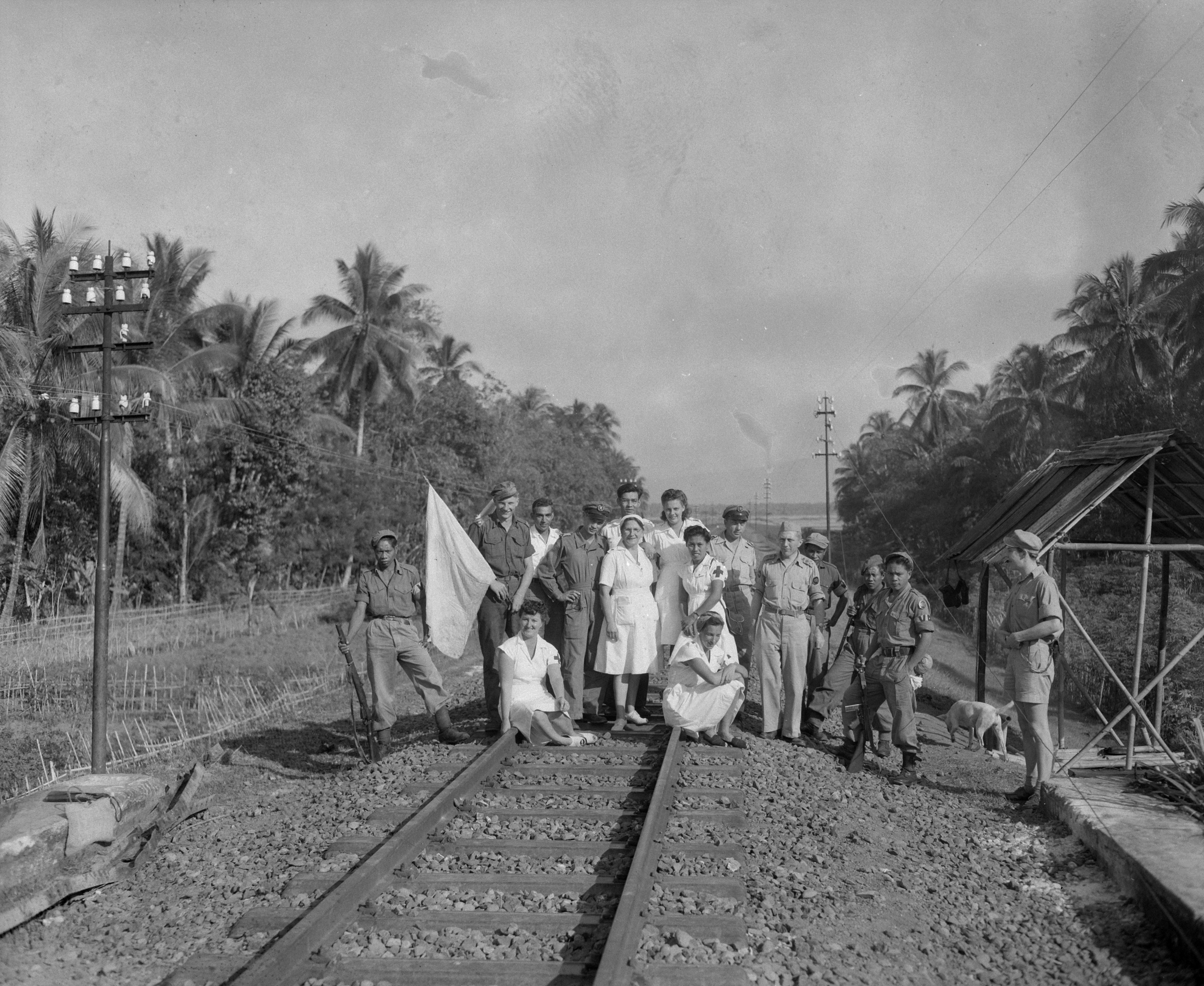 Collectie / Archief : Fotocollectie Dienst voor Legercontacten Indonesië Reportage / Serie : [DLC] Evacuatietrein vanuit Gombong Beschrijving : Gombong. Sinds enkele maanden worden bij Kali-Kemit, in de omgeving van Gombong evacués uit de Republiek, Nederlands gebied binnengebracht. Voor de ontvangst van de Nederlandse onderdanen is er een speciale commissie, bestaande uit Rode Kruispersoneel uit Batavia, enige artsen en de militairen, die in het kader van de hulpverlening met het Rode Kruis samenwerken. Het ontvangstcomité, met witte vlag, in afwachting van de trein met evacués uit de Republiek Datum : 8 augustus 1948 Locatie : Gombong, Indonesië, Java, Nederlands-Indië Fotograaf : Overbeek, van / DLC Auteursrechthebbende : Nationaal Archief Materiaalsoort : Negatief (zwart/wit) Nummer archiefinventaris : bekijk toegang 2.24.04.03 Bestanddeelnummer : 14139